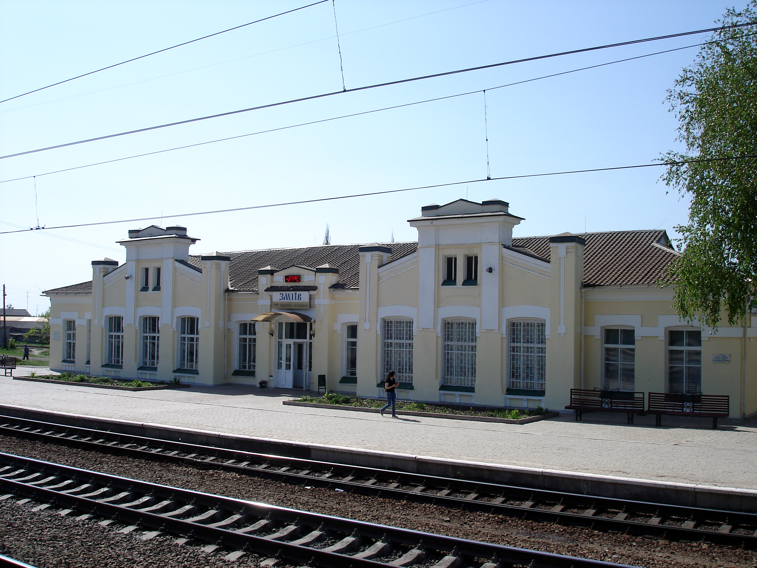 Залізничний вокзал станції Зміїв.